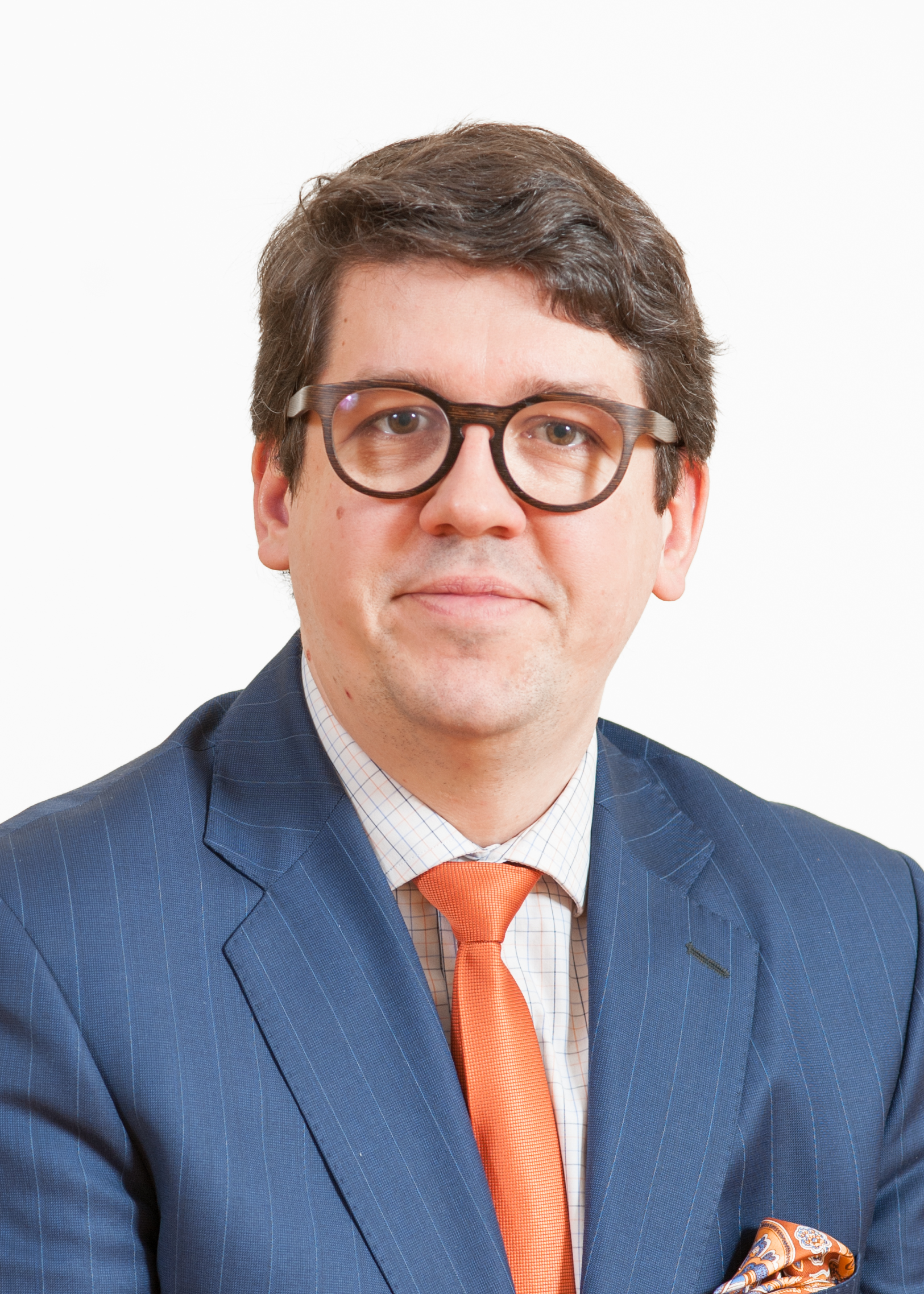 Priit Sibul